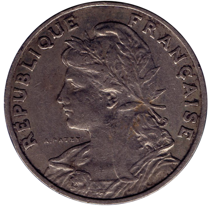 Avers 25 centimes type Patey émise en 1903